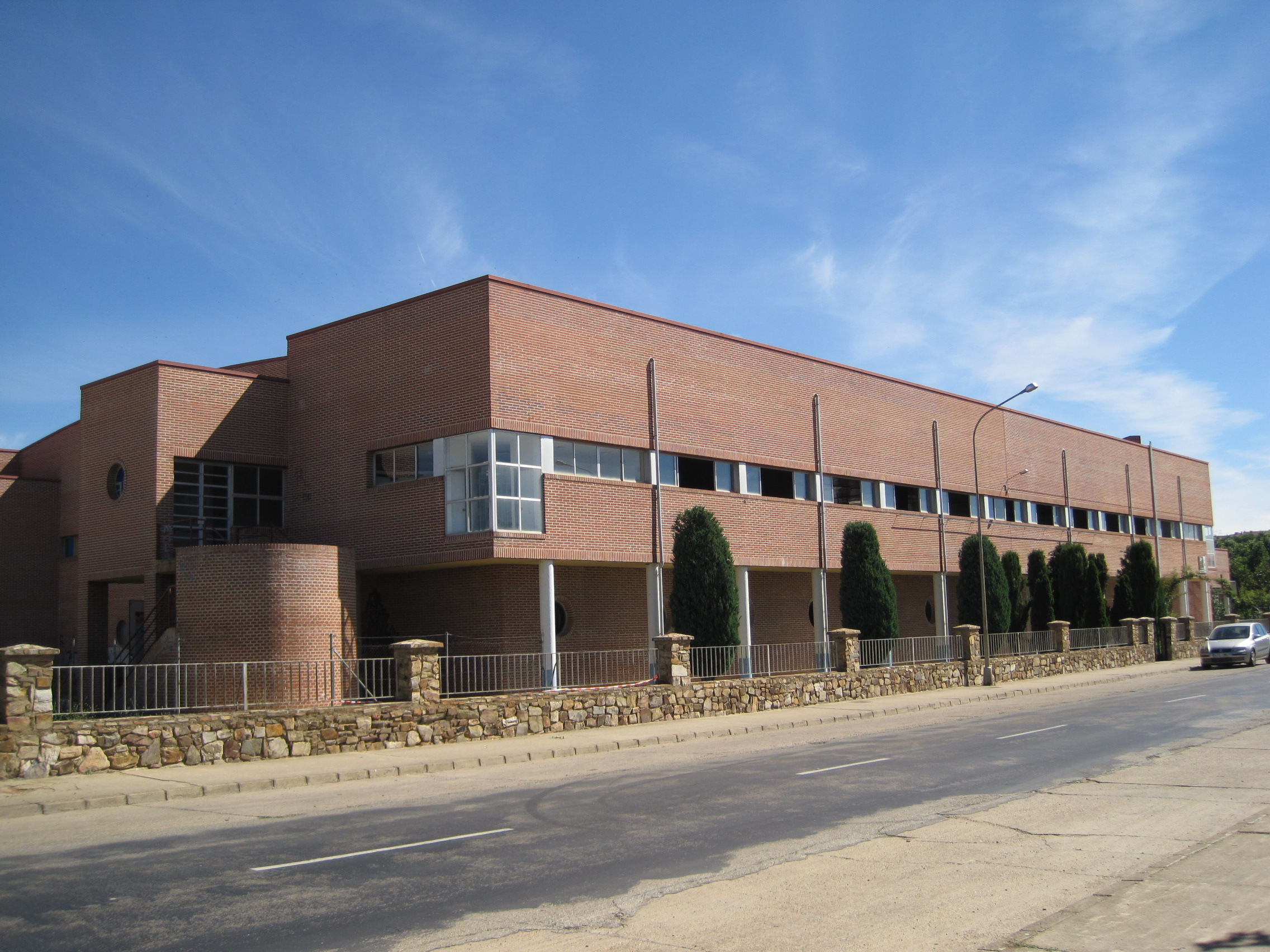 Pabellón polideportivo "Felipe Miñambres", en Astorga (provincia de León, España).